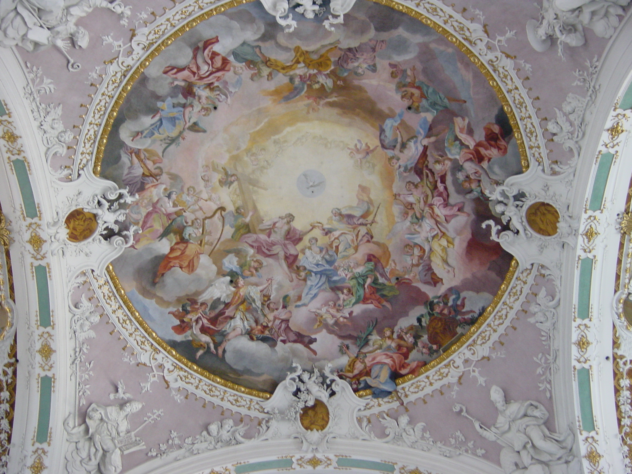 Deckengemälde der Abteikirche von Kloster Seligenthal, Landshut, von Johann Baptist Zimmermann